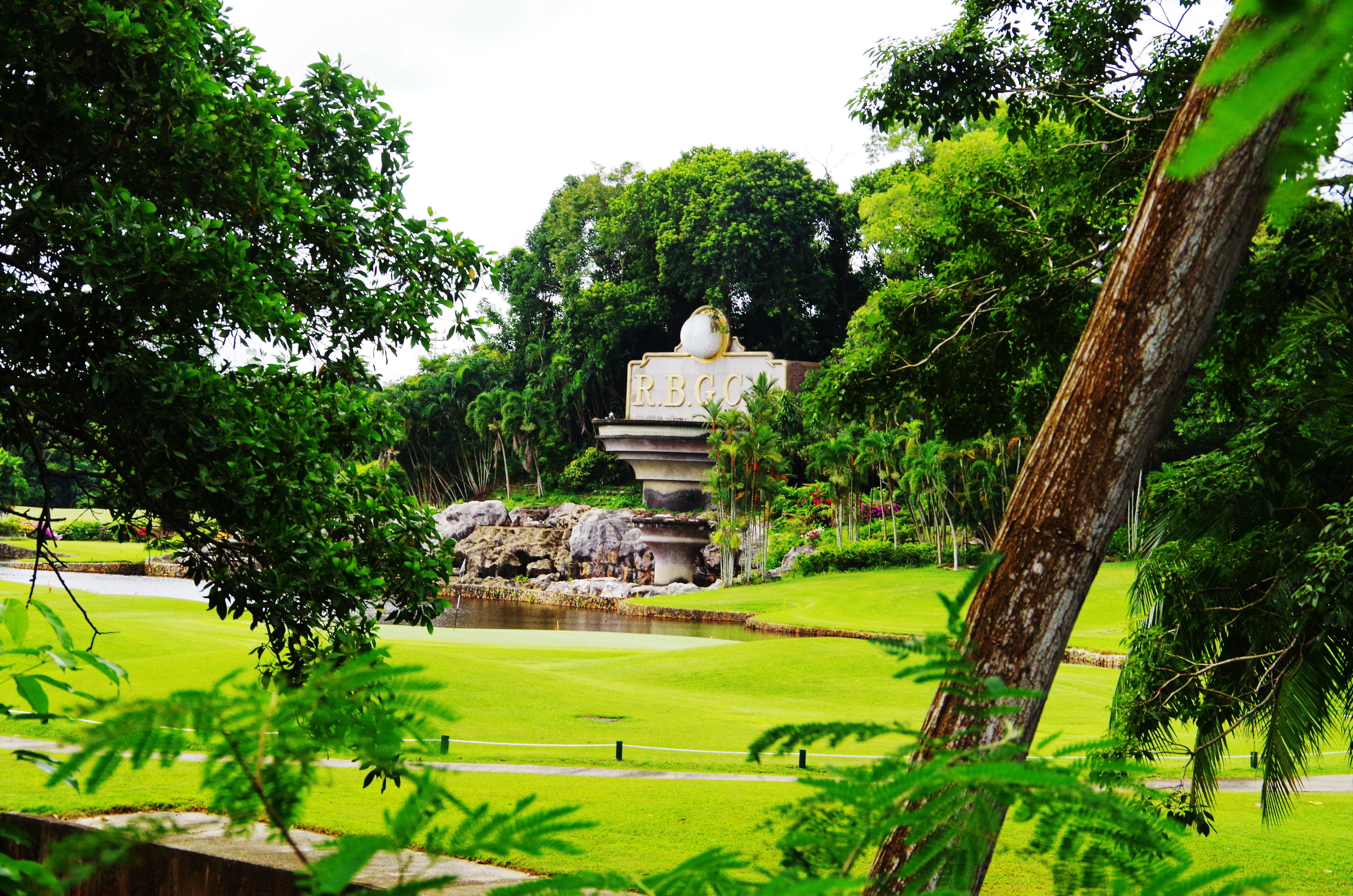 Royal Golf & Country Club fountain — Jerudong, Brunei. Jerudong Royal Polo Park.